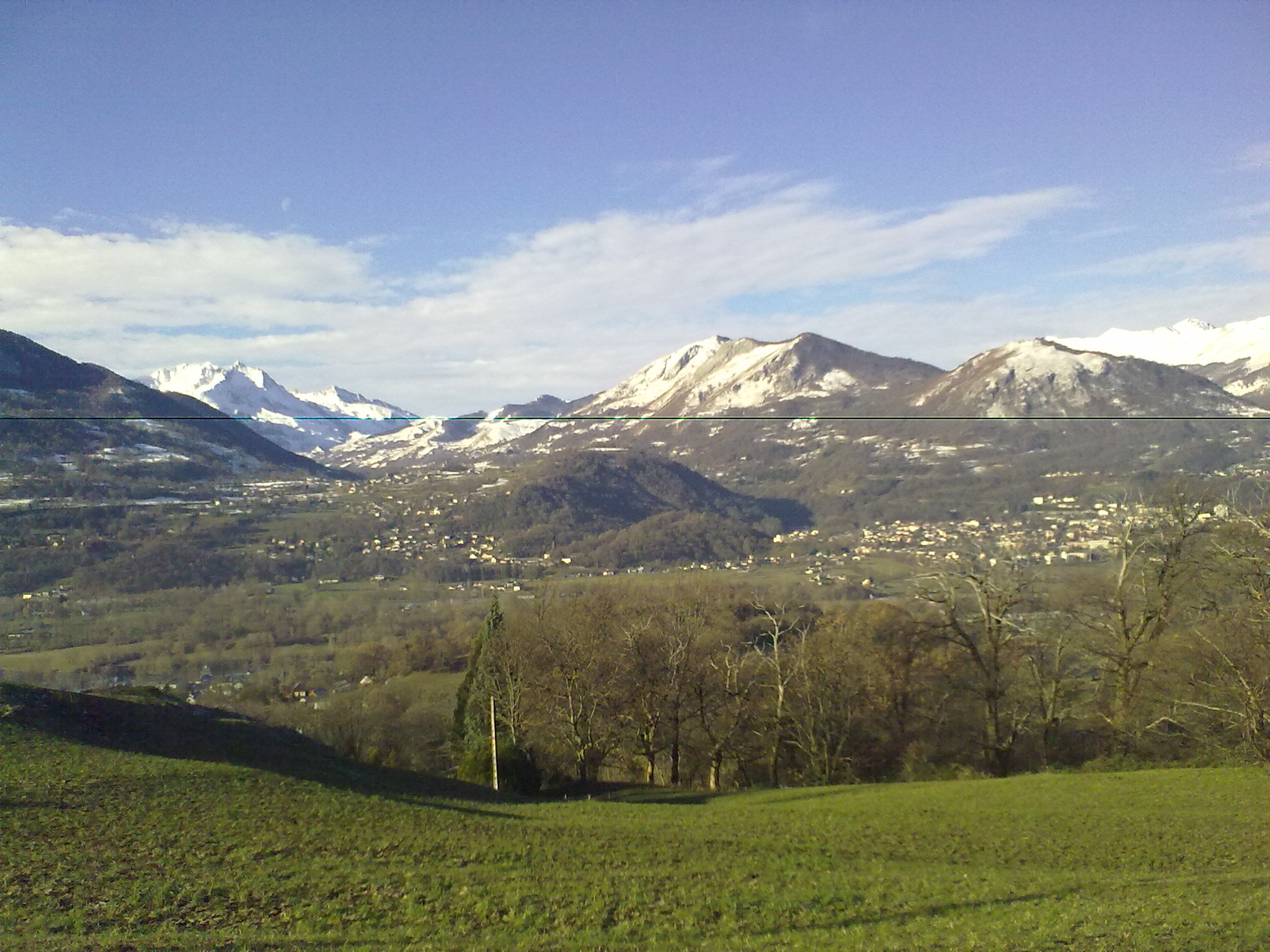 Vue sur la montagne depuis Arbouix